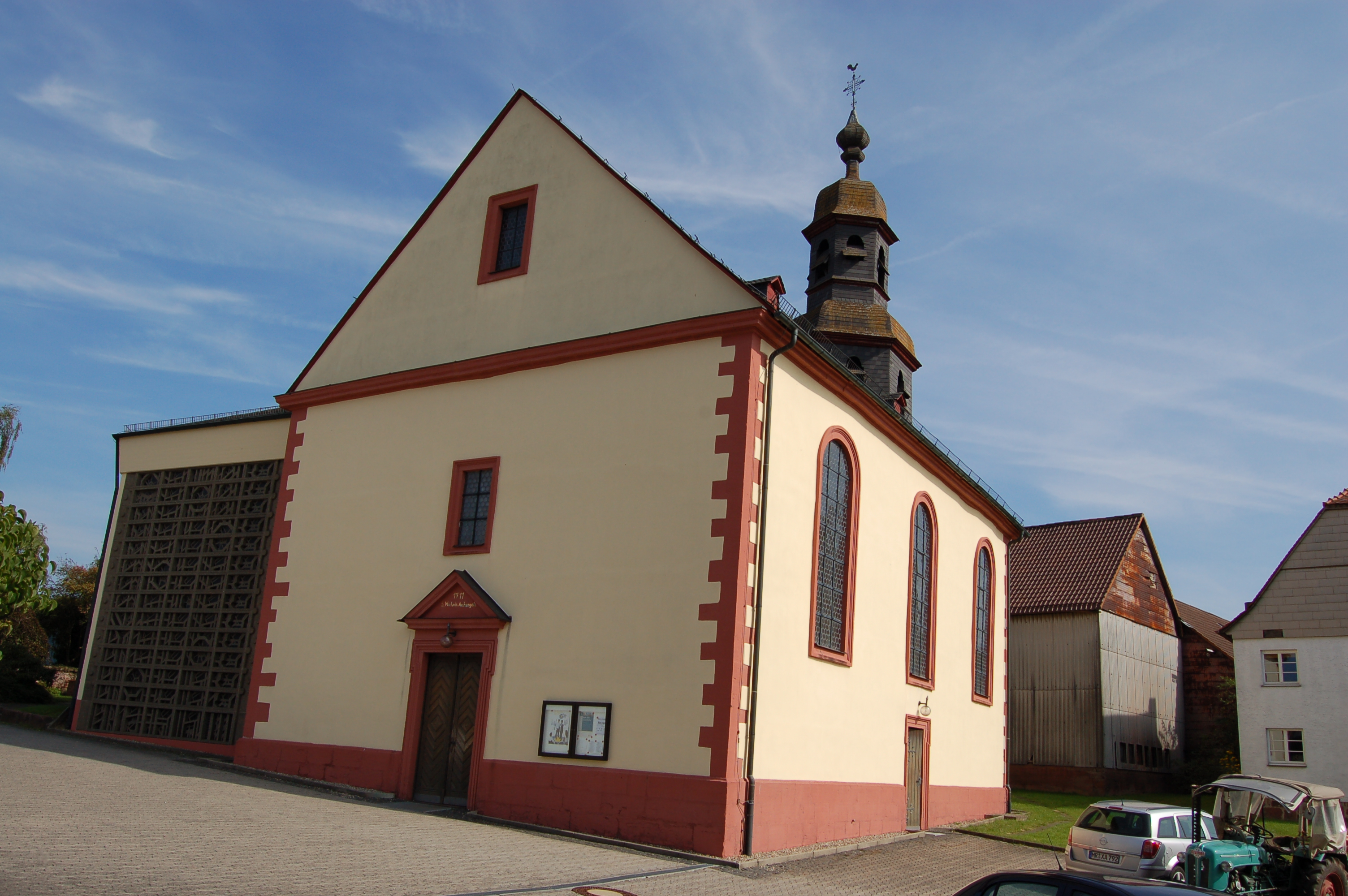 Dieses Foto entstand im Rahmen des Projekts Wiki Loves Monuments Mittelhessen, das aus dem Community-Projektbudget von Wikimedia Deutschland e. V. gefördert wurde.